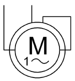 Normsymbol Universalmotor